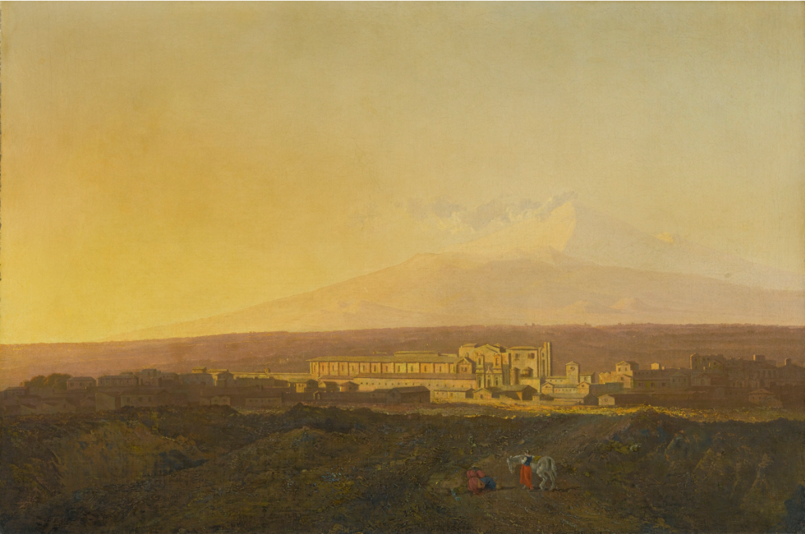 Joseph WRIGHT of Derby, View of Catania, Sicily, with Mount Etna beyond, milieu du XVIIIe-fin du XVIIIe, huile sur toile, 84,5 × 126,5 cm, coll. particulière, Paris